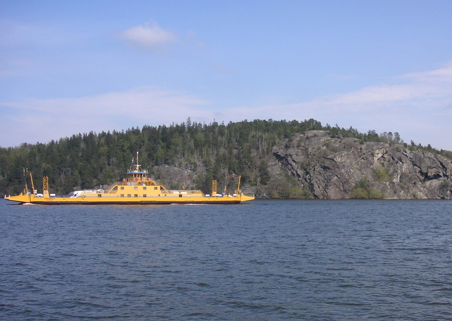 Korpberget och M/S Veronika